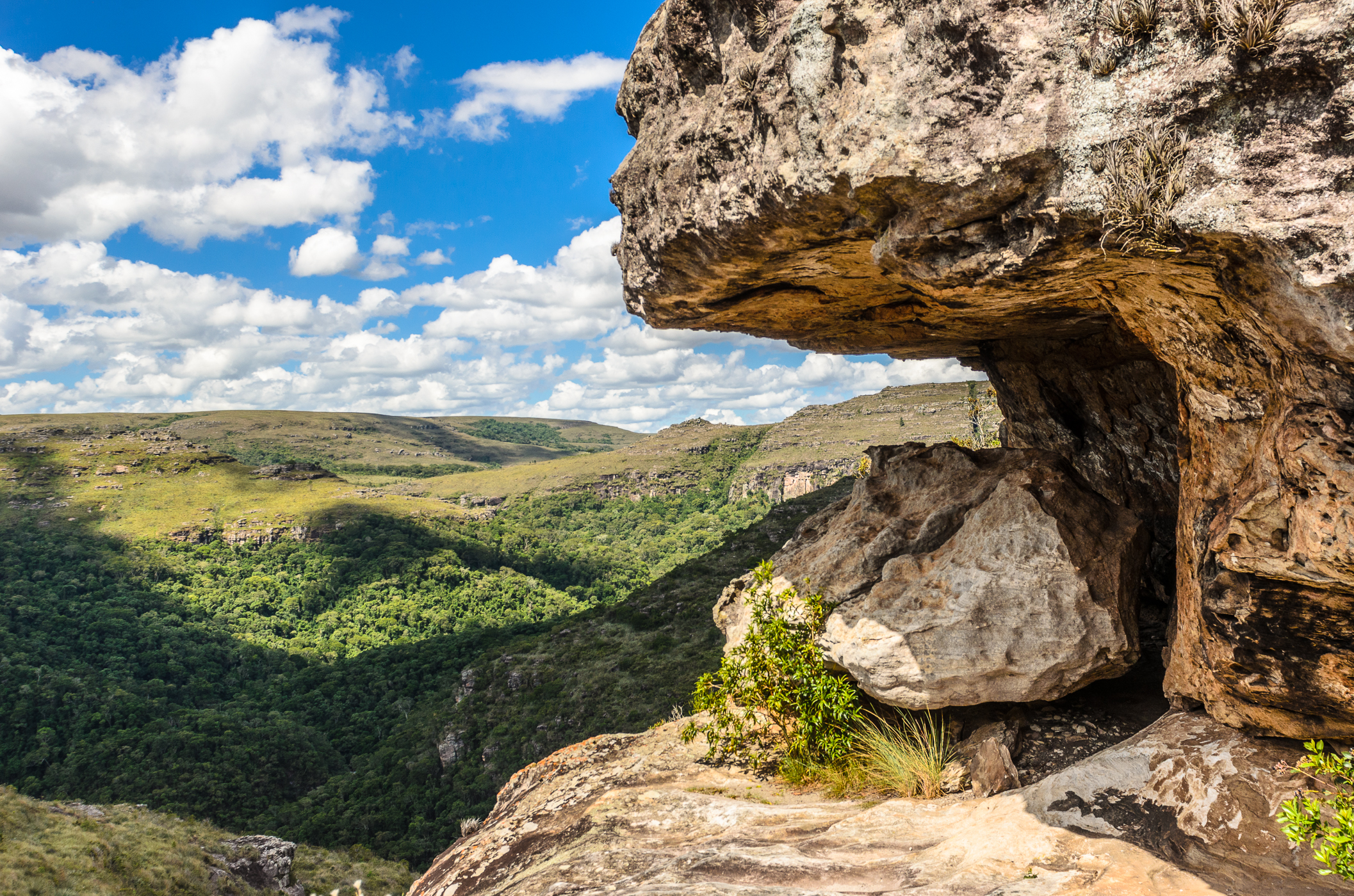 Formação rochosa que servia de abrigo para antigos moradores da região. Ainda há resquícios de pinturas rupestres em seu interiror.